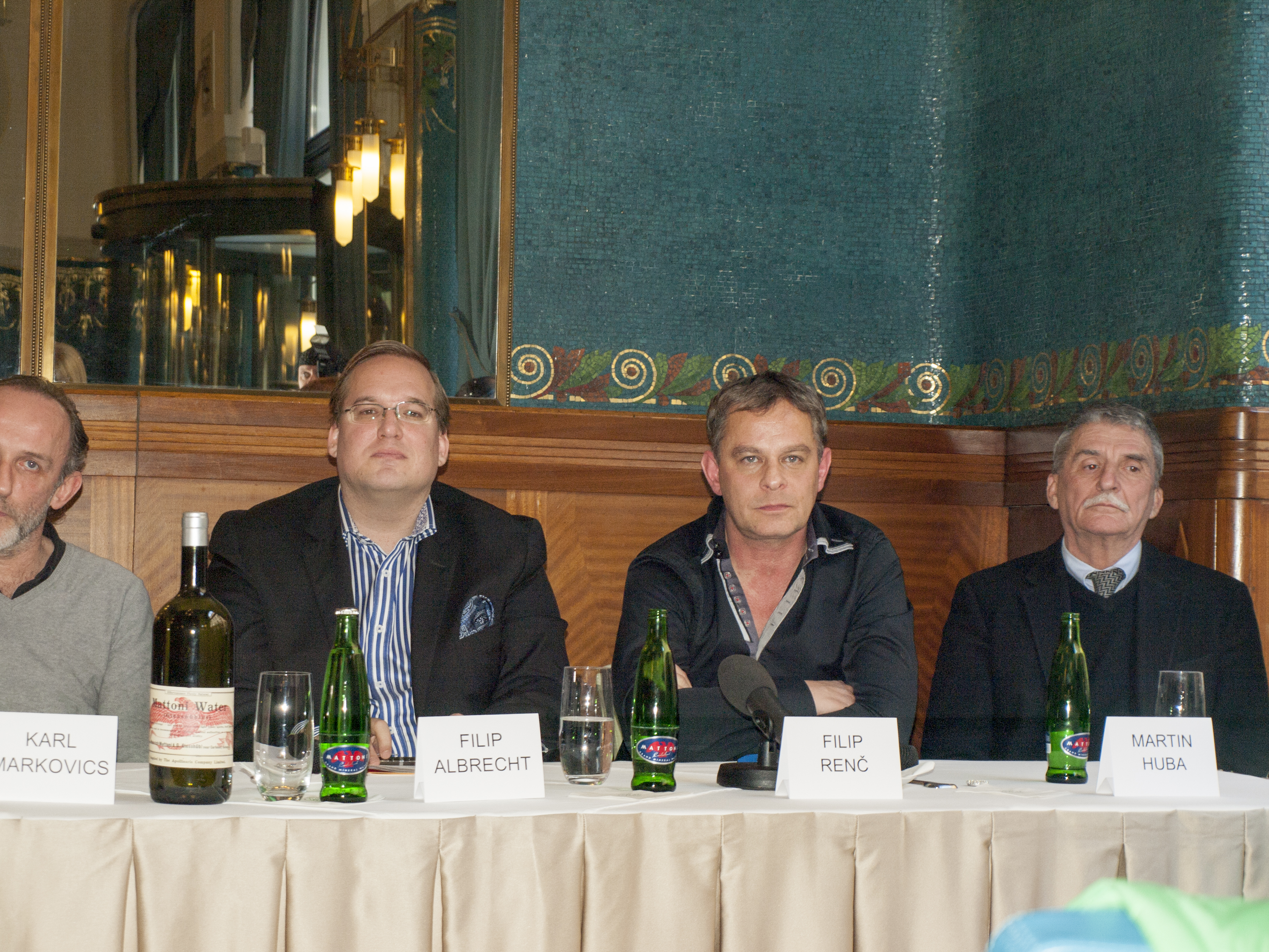 Fotky z novinářské konference z 3.2.2015 - Autor Karolína Černá (Blanka Borová) pro & 10Mpix.cz